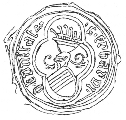 Pečeť Erharta mladšíhi z Kunštátu